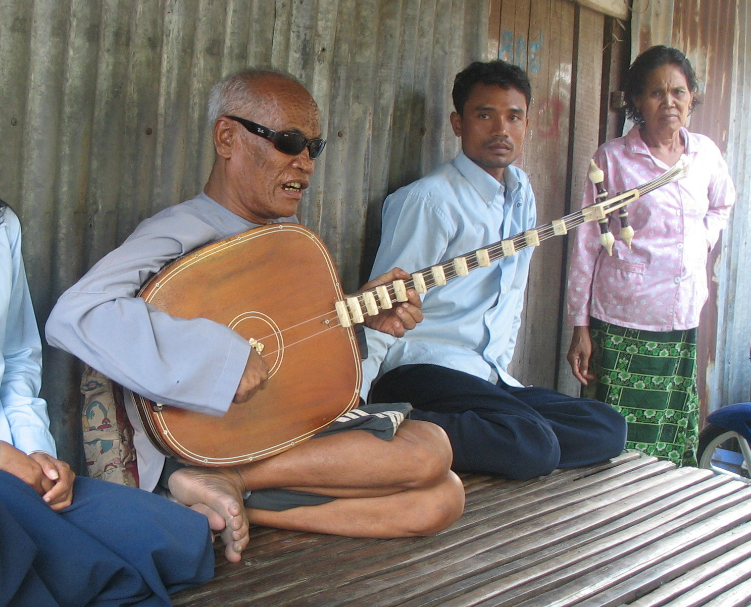 Kong Nay playing the chapei dong veng, Phnom Penh